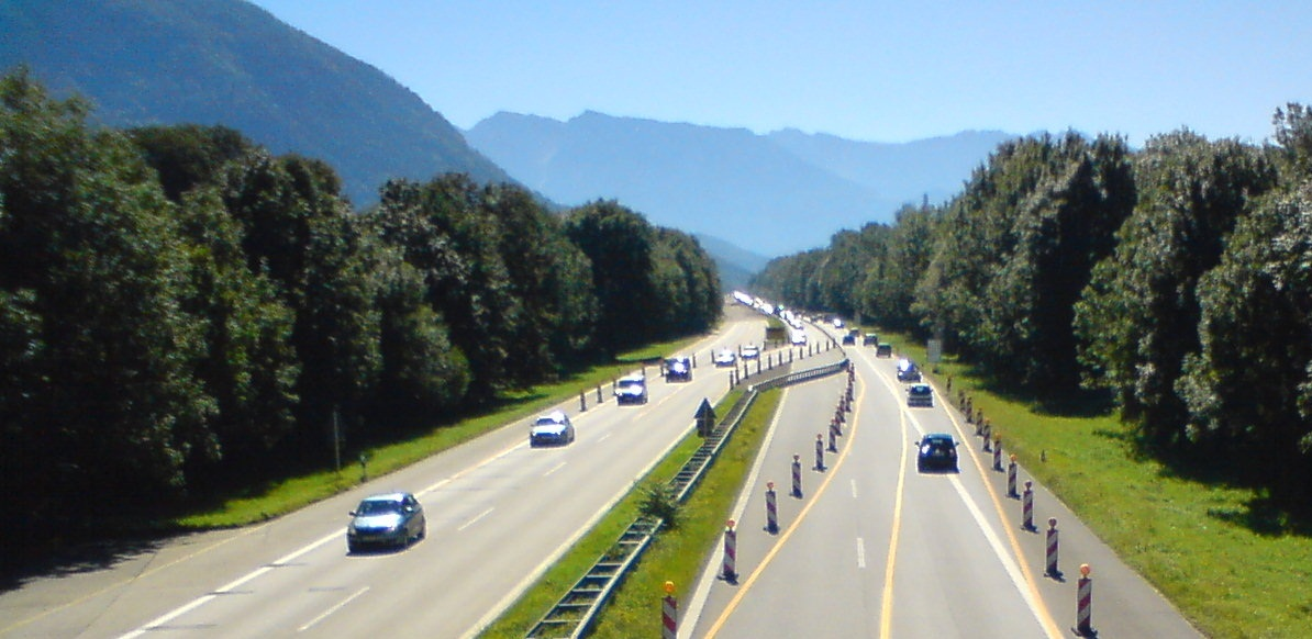 A93 Gegenverkehrsbereich